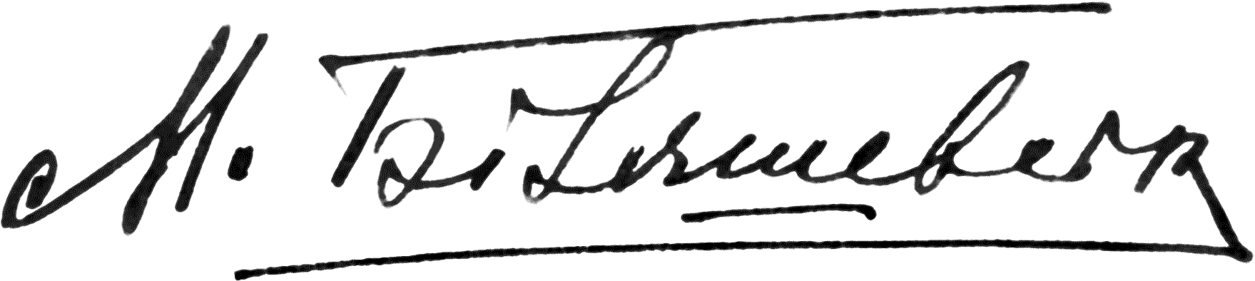 Роспись профессора Николая Беляшевского